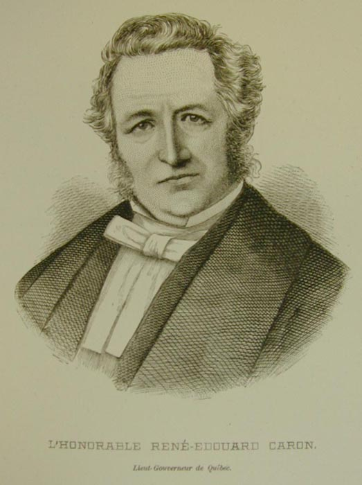 Portrait of René-Édouard Caron, in Benjamin Sulte, Histoire des Canadiens-Français. Montréal, Wilson & Cie éditeurs, 1882-1884, 8 vol.